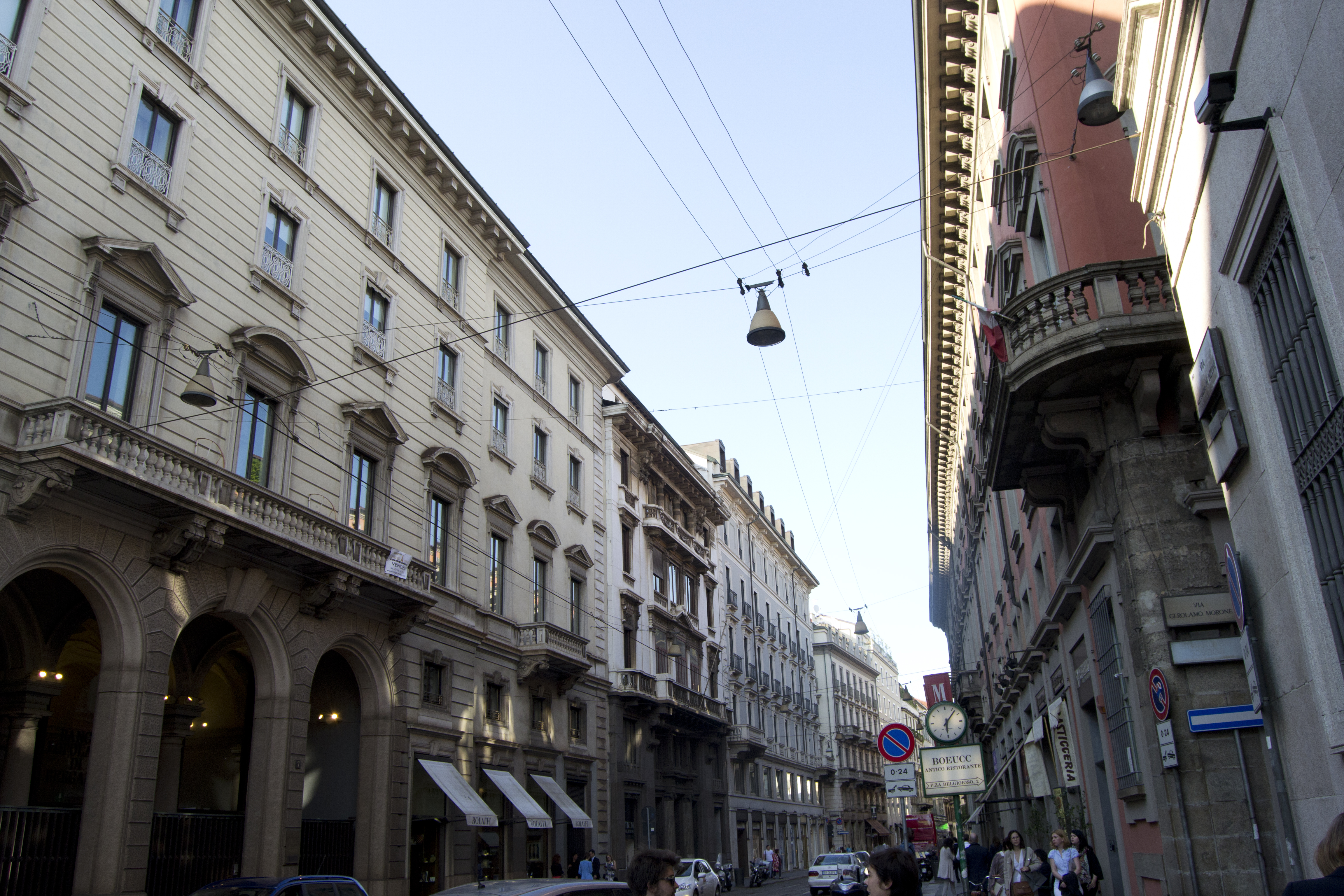 Via Alessandro Manzoni, Milano